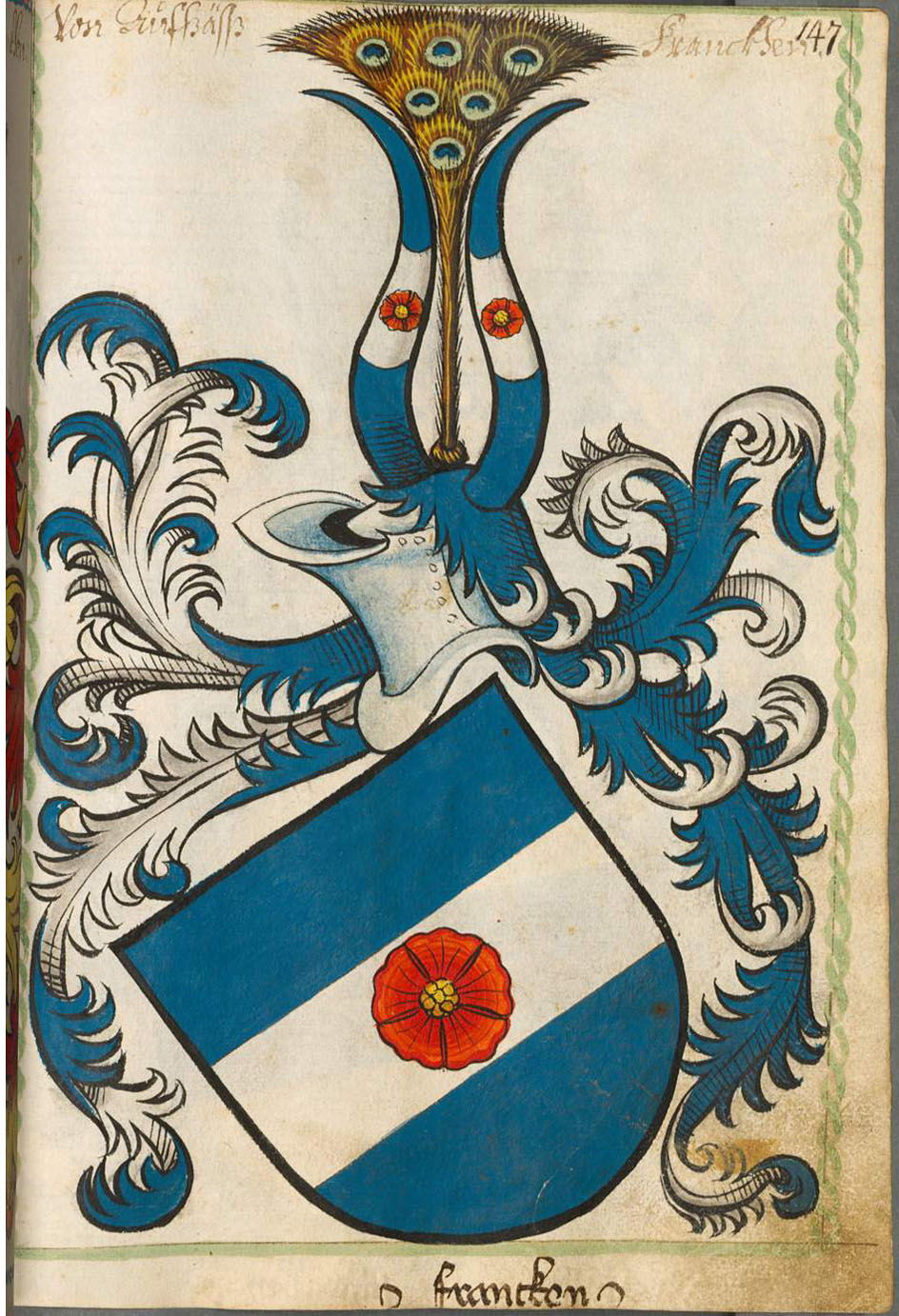 Scheibler'sches Wappenbuch , älterer Teil Aufseß